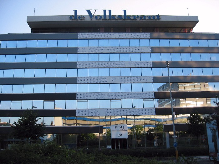 Hoofdkantoor Volkskrant BV, Wibautstraat 150, Amsterdam. Eigen foto, gemaakt 2004-07-27. In de weerspiegeling van het gebouw zijn de gebouwen van Trouw (links) en Het Parool (rechts) te zien.